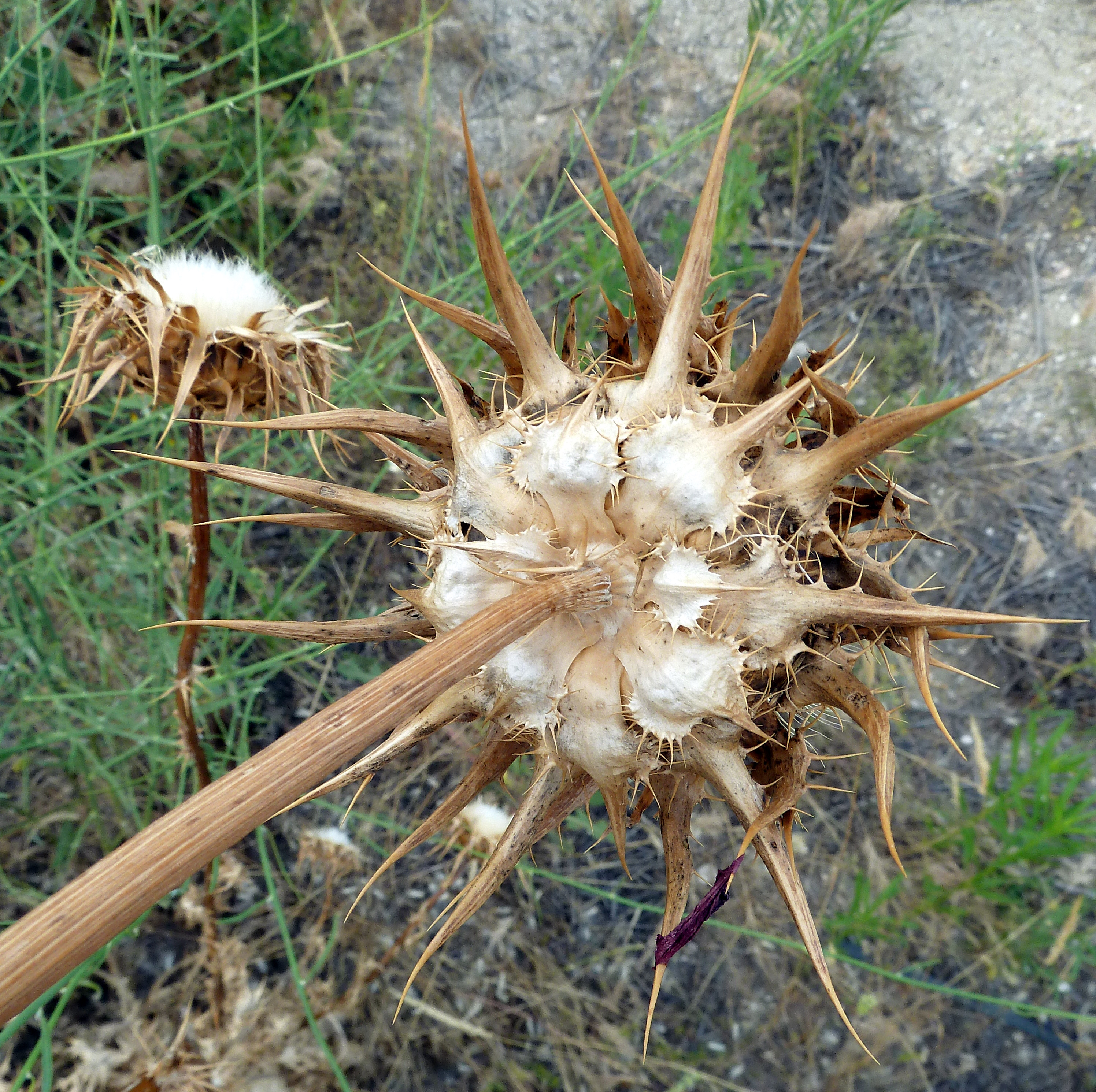 Silybum marianum (cardo mariano): capítulo seco evidenciando las brácteas externas - FFCC Abroñigal-Embajadores (Madrid, España).